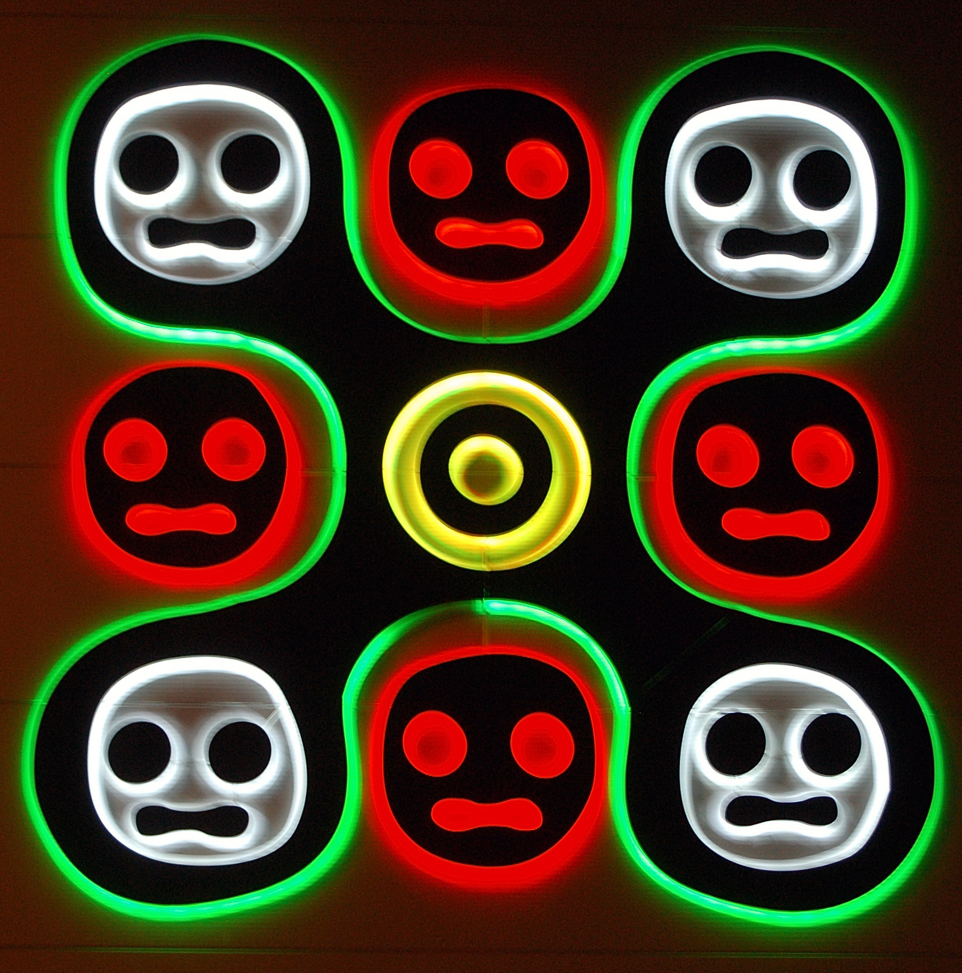 "Fokuserat här för ett koncentrat nu" av Matti Kallioinen 2010 utförd i brons placerad på fasaden till Karlstad Curling Arena/Skate/BMX-hall, Tingvalla sportcenter, Sandbäcken, Karlstad.